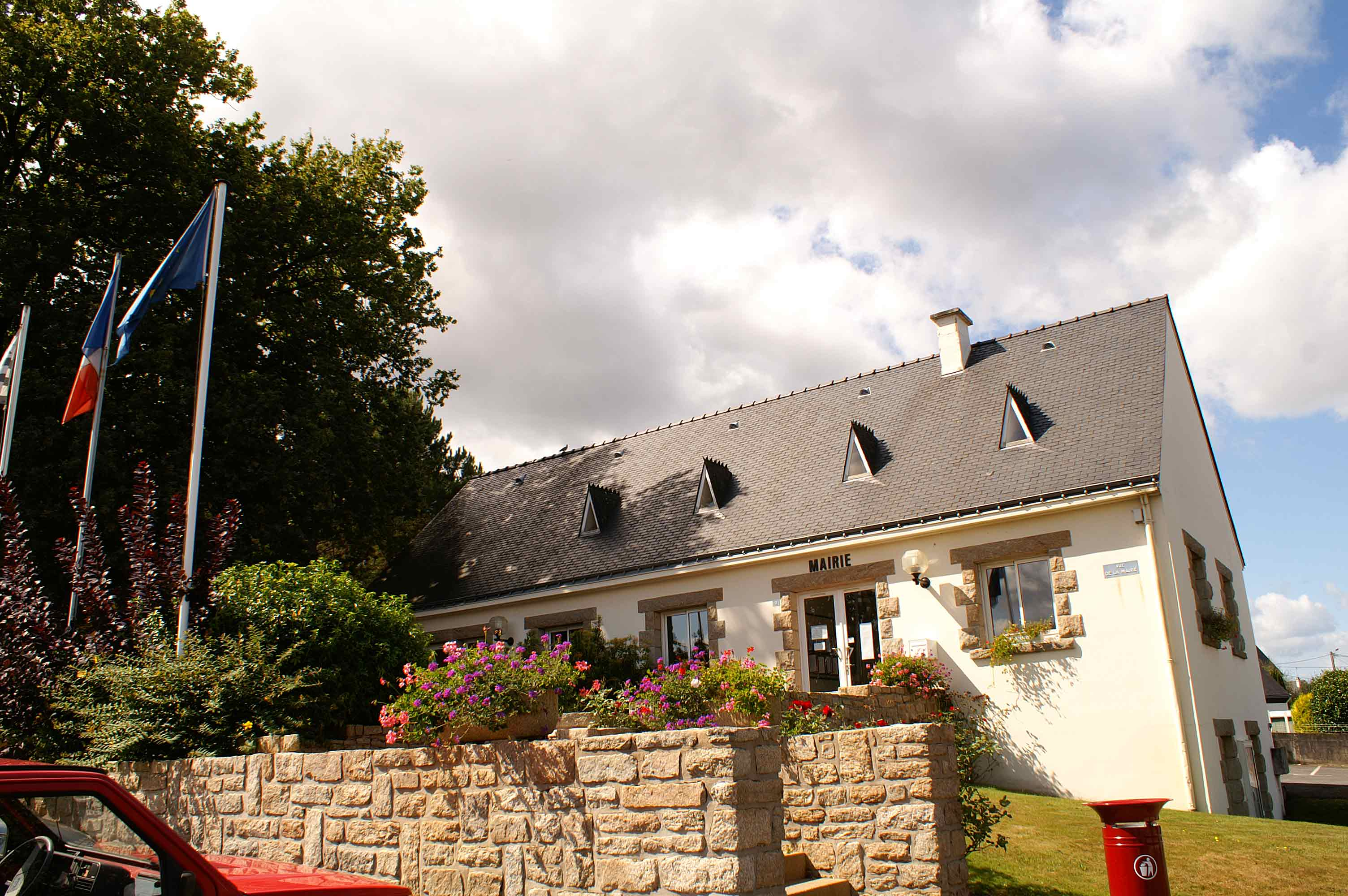 Mairie de Marzan, dans le Morbihan, le 4 septembre 2009